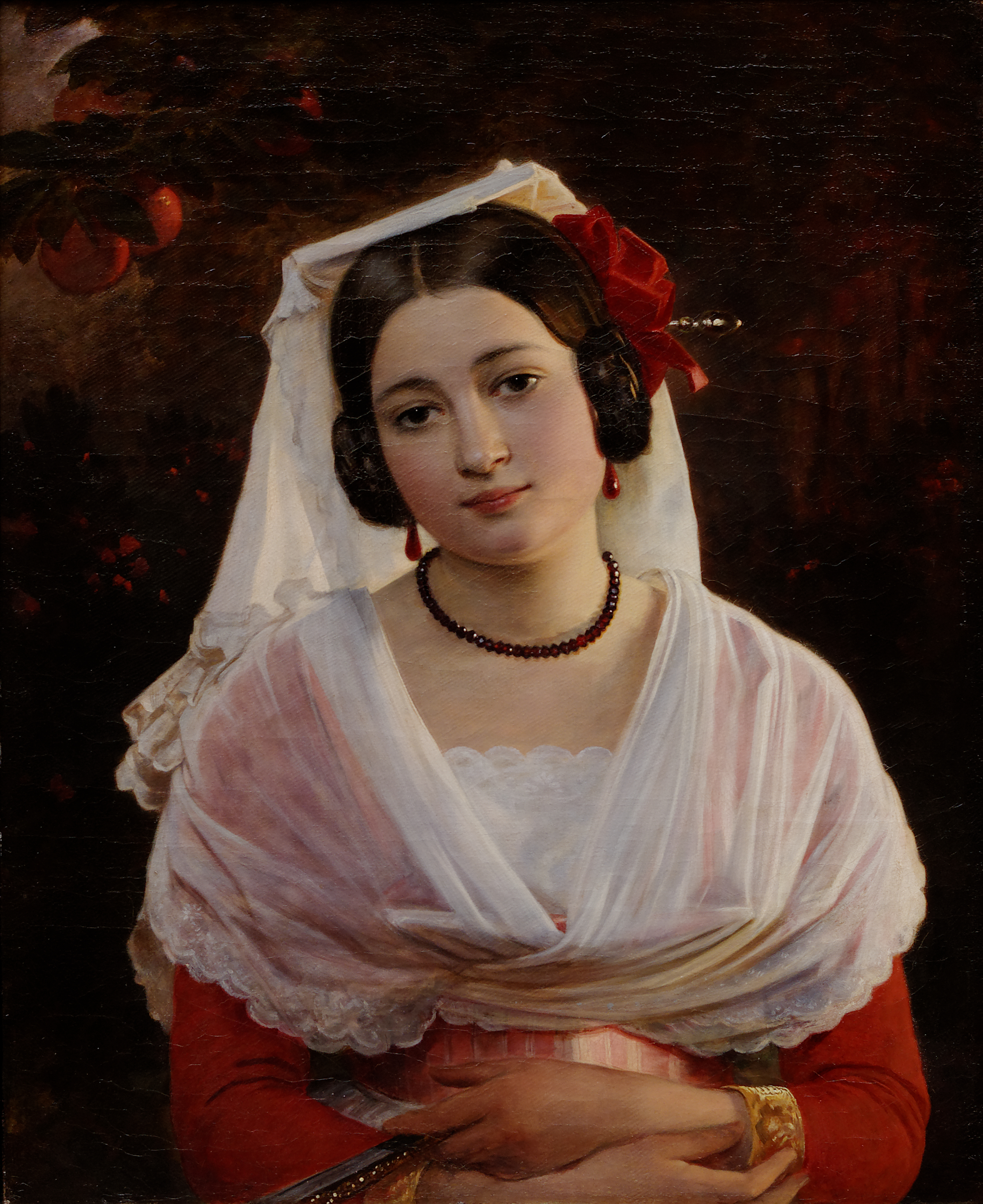 Felice Berardi from Albanolabel QS:Len,"Felice Berardi from Albano" label QS:Lde,"Felice Berardi aus Albano"